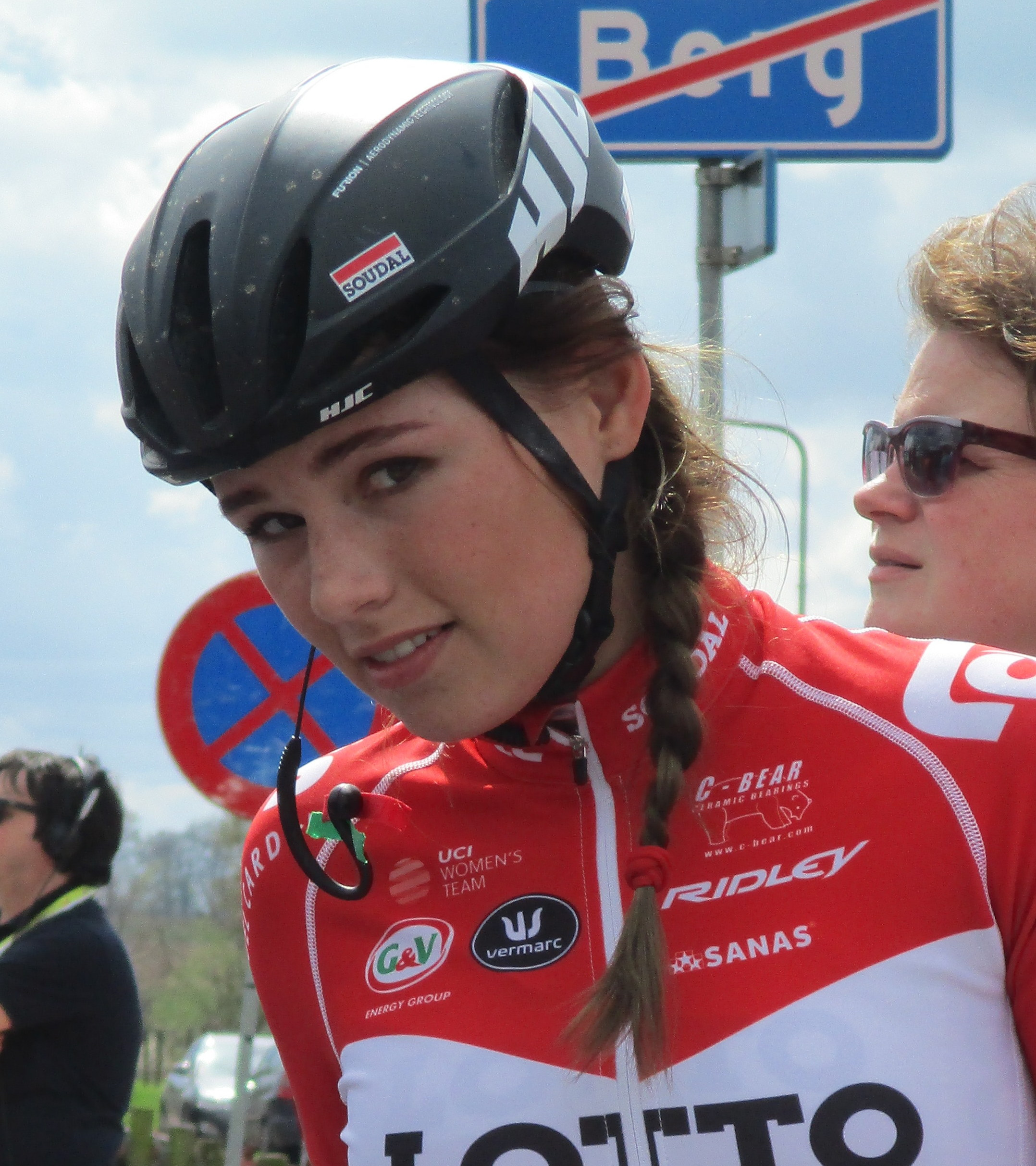 Finish van de Amstel Gold Race Ladies Edition 2018 in Berg, Valkenburg aan de Geul.